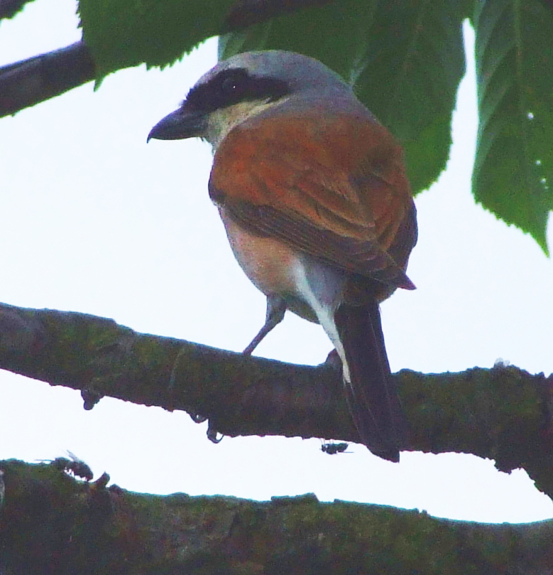 Lanius collurio male